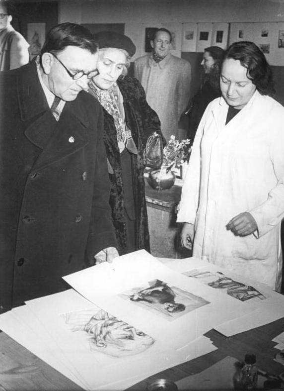 Zentralbild Höhne-Pohl 2Motive 5.11.1955 Prof. S.W. Gerassimow in Dresden Der sowjetische Gast, Prof. S.W. Gerassimow, Volkskünstler der RSFSR und ordentliches Mitglied der Akademie der Künste der UdSSR, der im Freundschaftsmonat in der DDR weilt, besuchte die Kunststadt Dresden. in der Hochschule für bildende Künste überzeugte er sich von den Studienmöglichkeiten unserer Studenten. In Diskussionen mit den Professoren und Dozenten wurden Probleme der Malerei behandelt. UBz: Prof. S. W. Gerassimow mit Frau Prof. Grundig bei der Beurteilung von Schülerarbeiten.